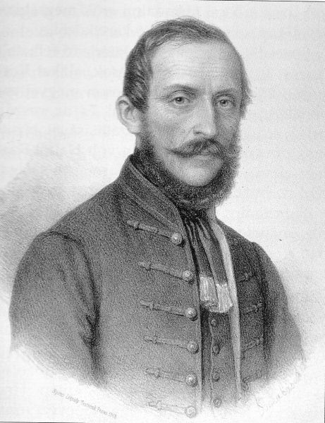 Csány László politikus, miniszter, az 1848–49-es szabadságharc vértanúja